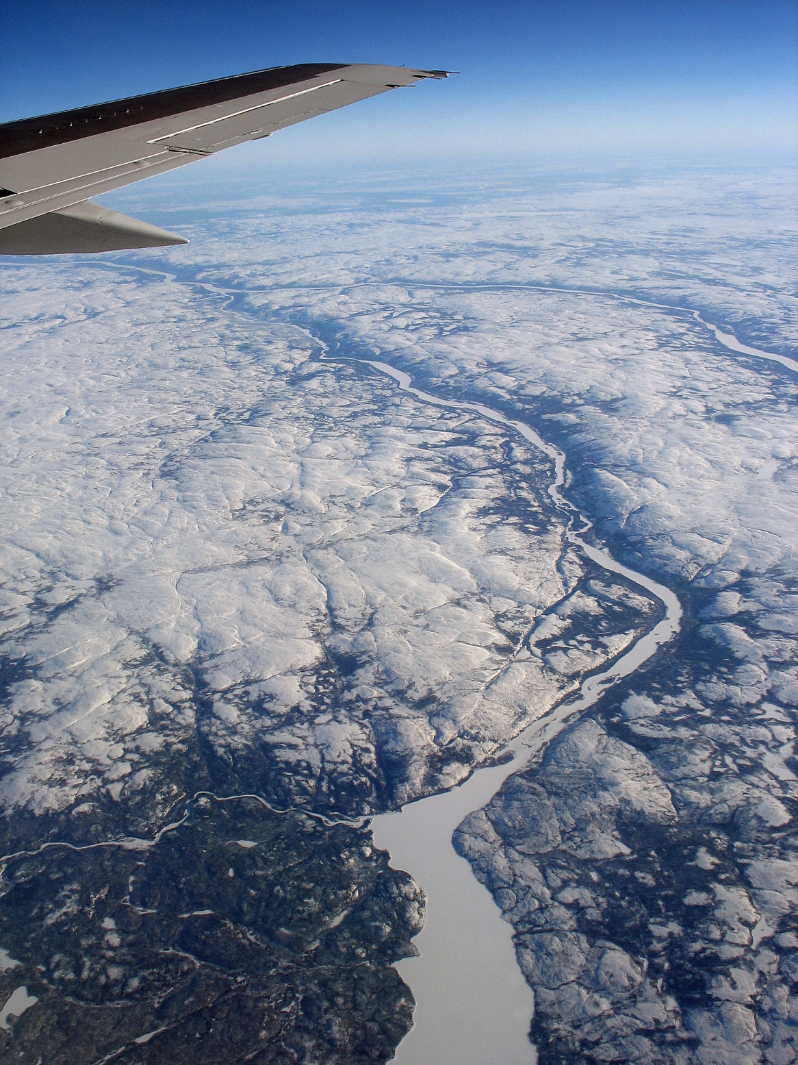 Rivière aux Mélèzes and confluence with Rivière du Gué as seen from airplane, northern Quebec, Canada